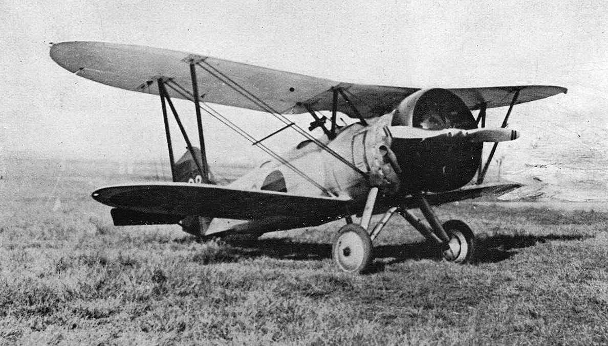 90式練習戦闘機は90式艦上戦闘機を複座改造した練習機。